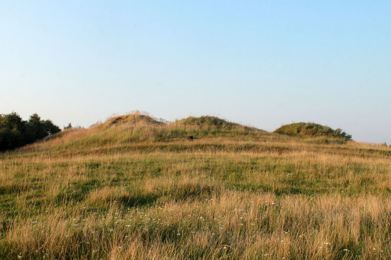 Пачаевічы. Курганны могільнік, мясцовая назва - Маскоўскія горы